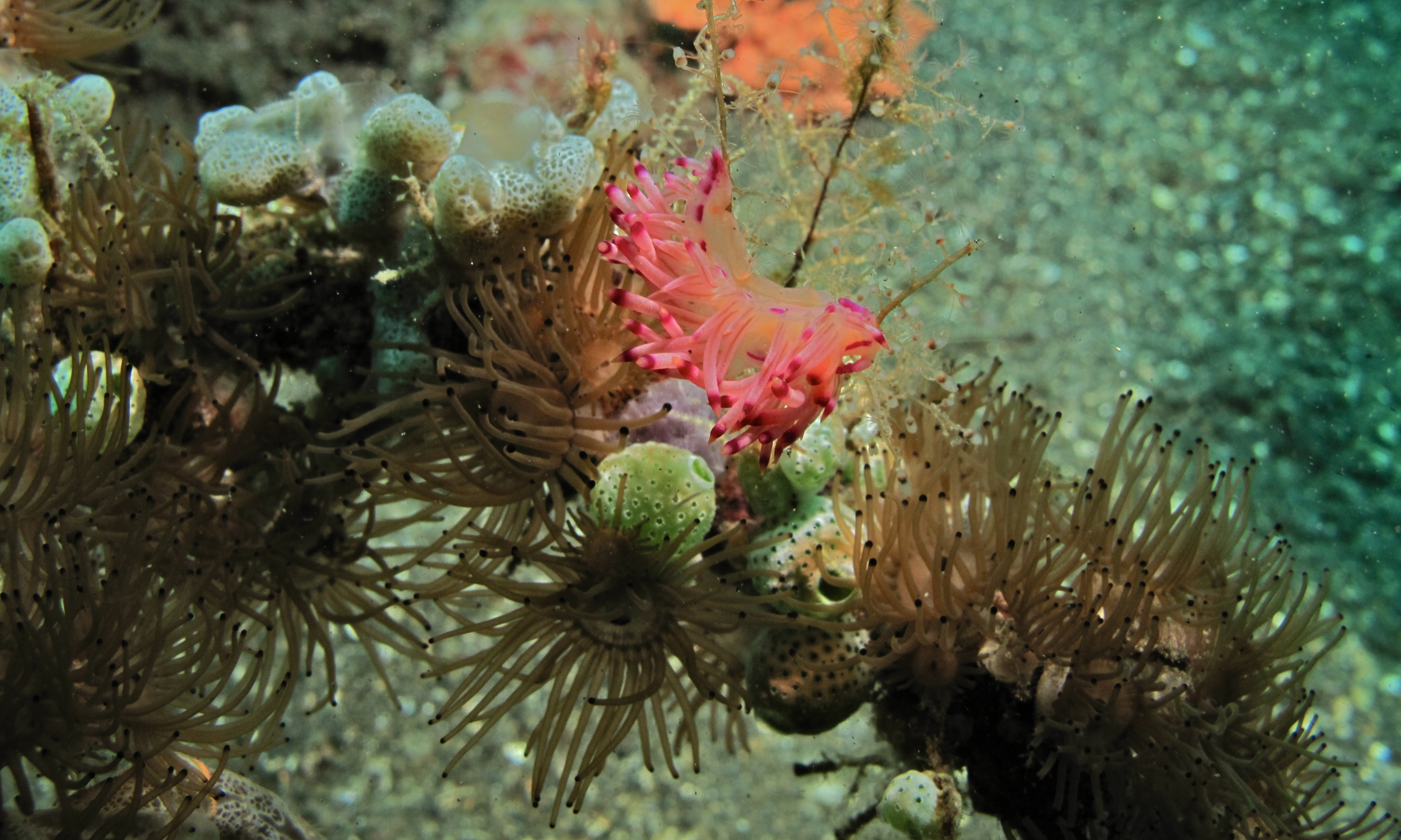 Makawide, Lembeh Strait, Sulawesi, INDONESIA